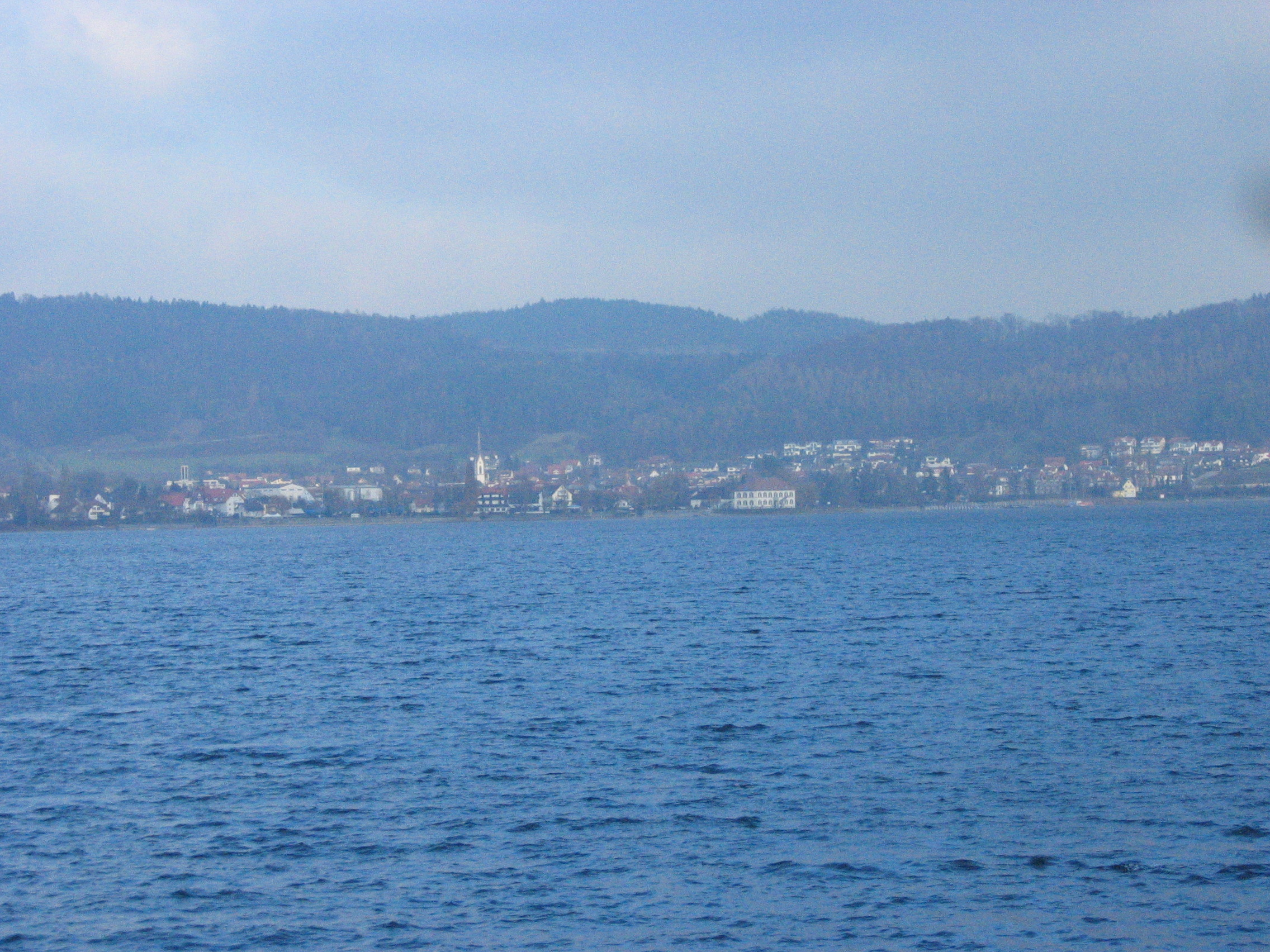 Ludwigshafen am Bodensee; Sicht von Bodman